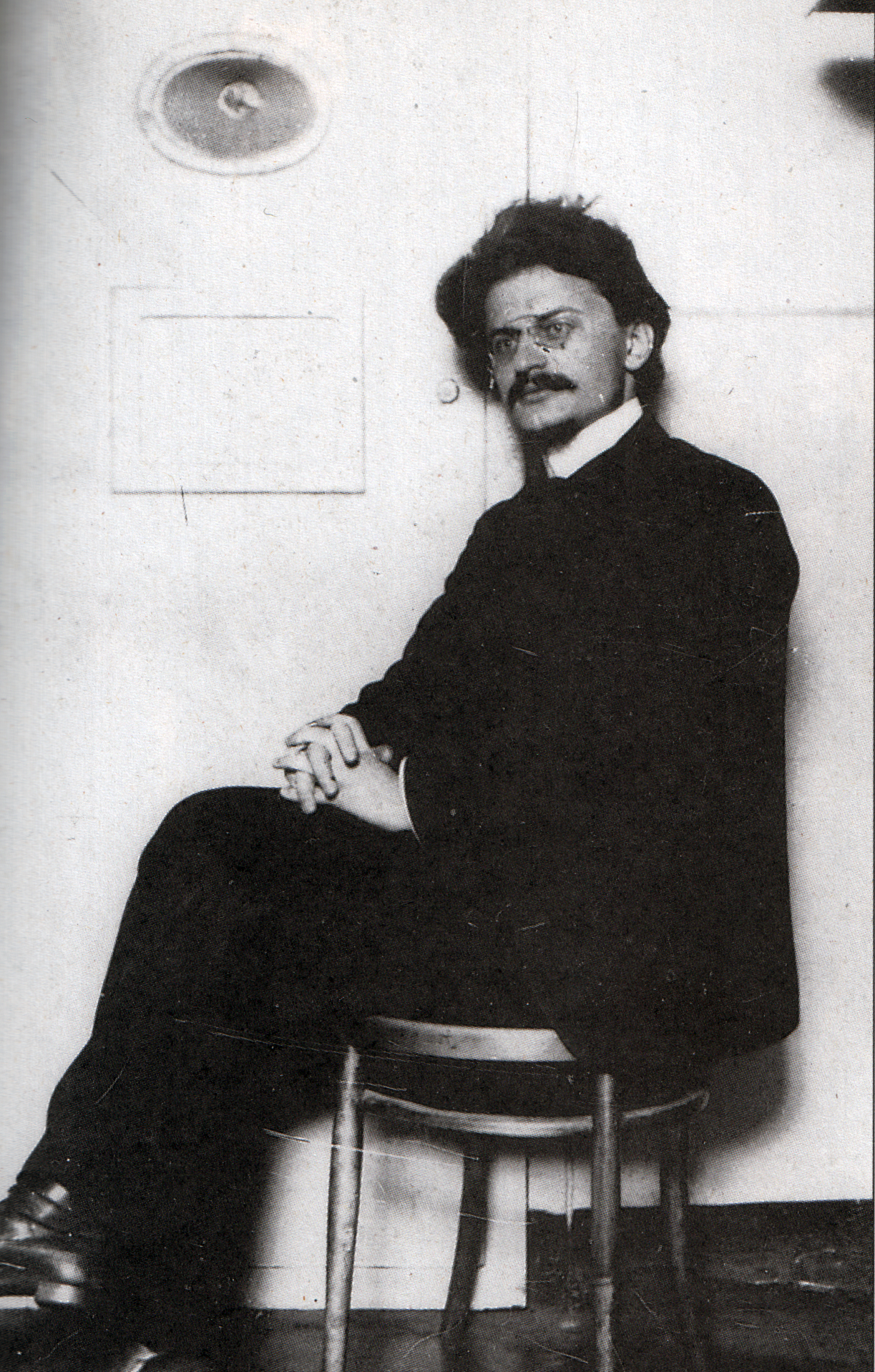 León Trotski en prisión en la Fortaleza de Pedro y Pablo en San Petersburgoo en 1906.